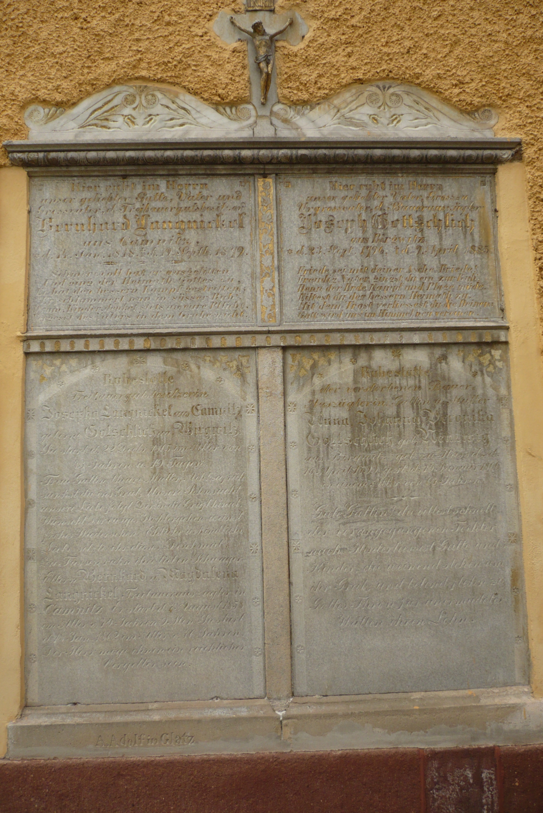 Kościół